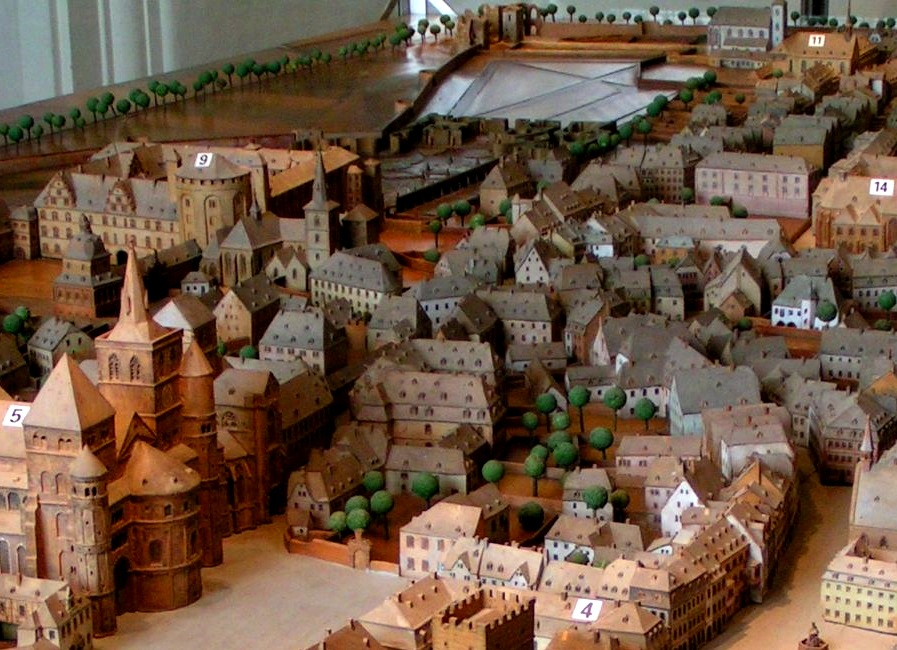 Trier Museum Simeonstift - Stadtmodell von Trier um 1800, Detail